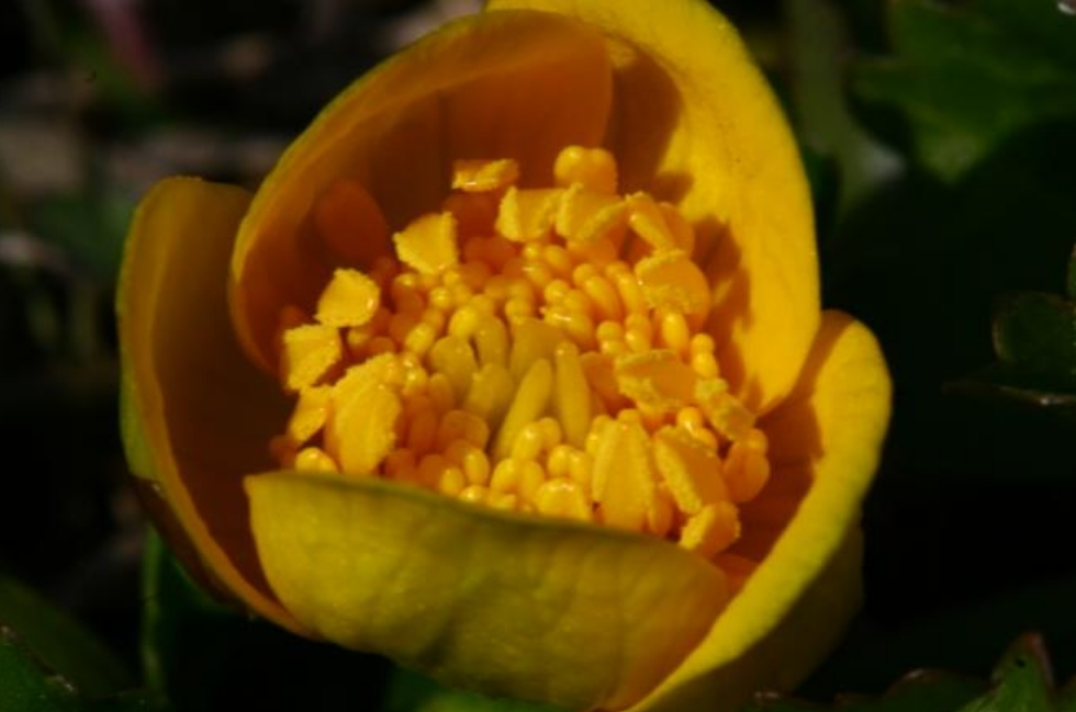 Caltha palustris